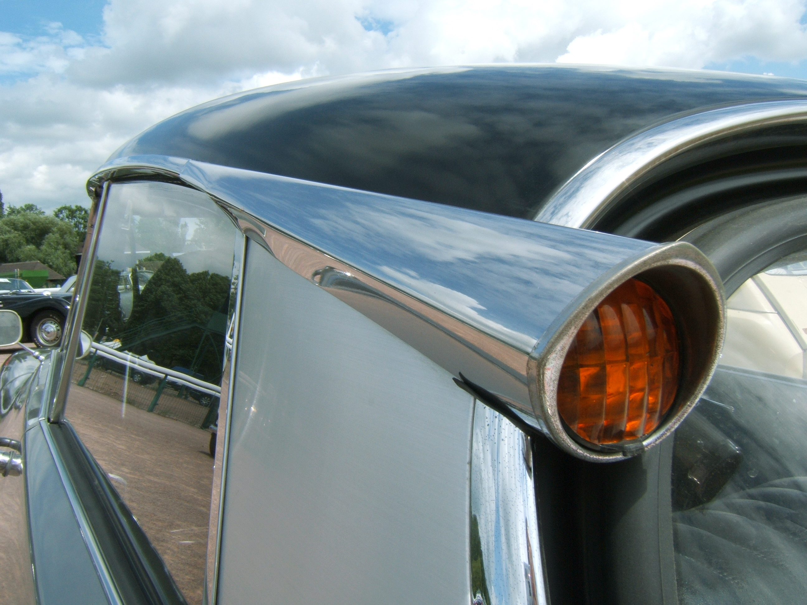 Le fameux clignotant arrière de la DS installé dans le prolongement de la gouttière.